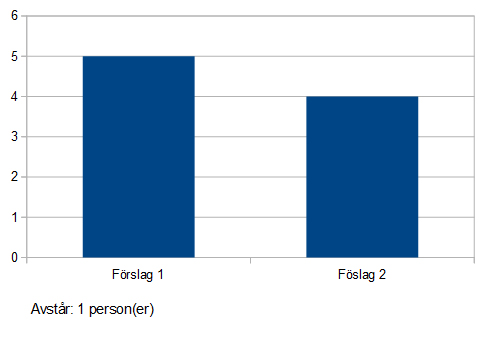 Skapad i Open Office 4.1.1